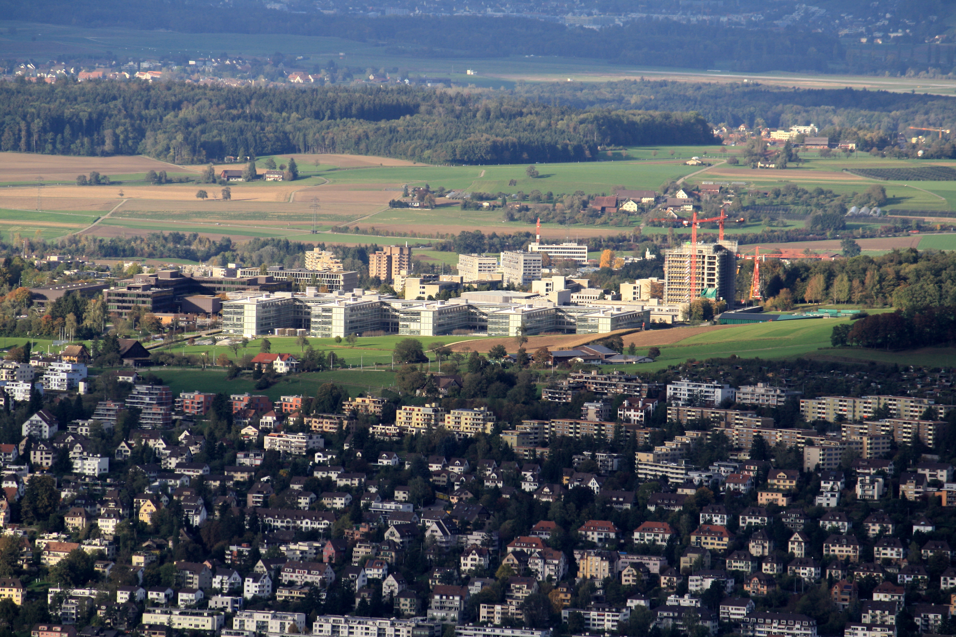 Zürich-Höngg, ETH Hönggerberg and northwestern parts of Waidberg, as seen from Uetliberg Aussichtsturm, Rümlang in the background.